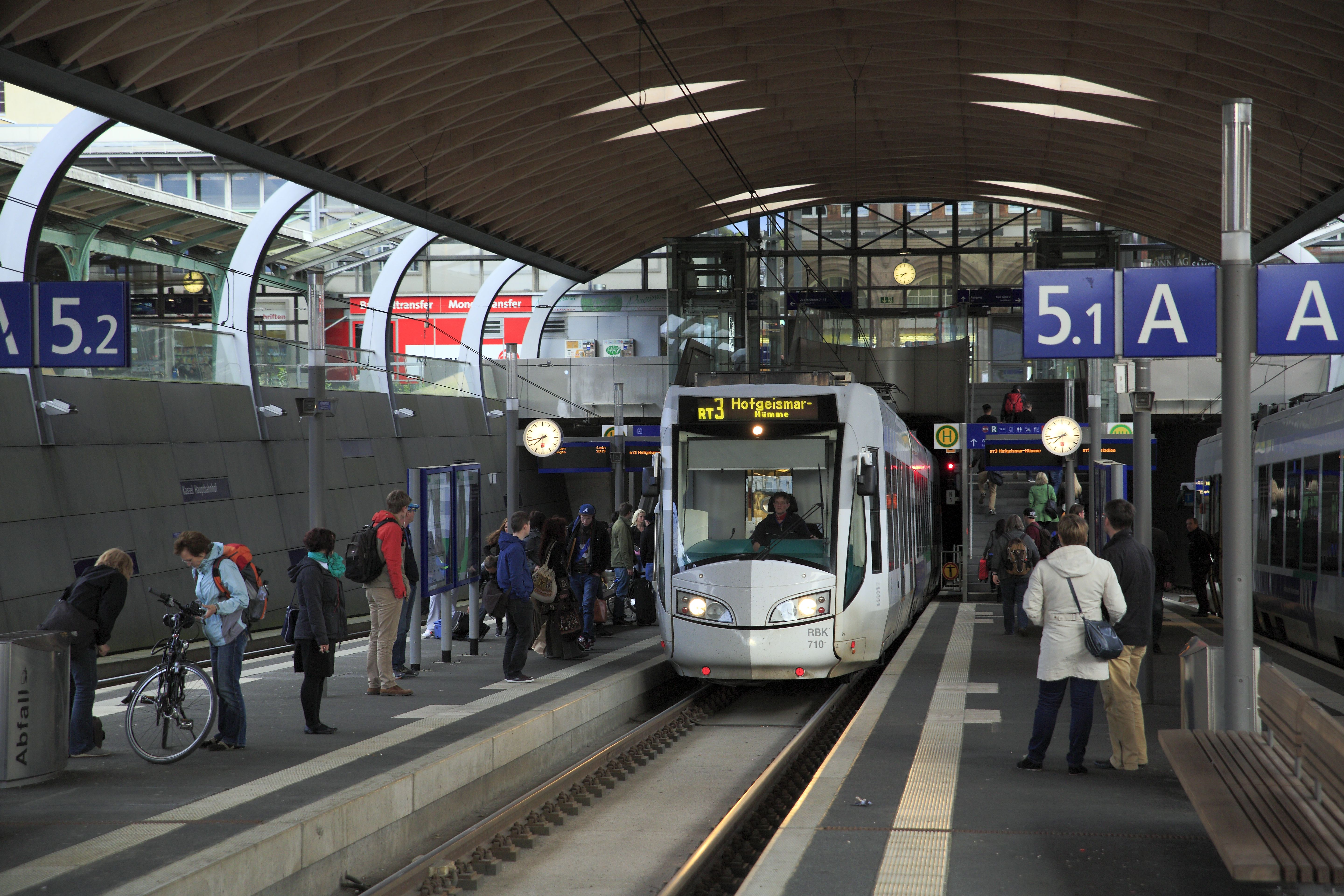 Zweisystemwagen auf Linie RT 3 nach Hofgeismar, Gleis 5. Der Fahrgastwechsel ist auf diesem Gleis beidseitig möglich.